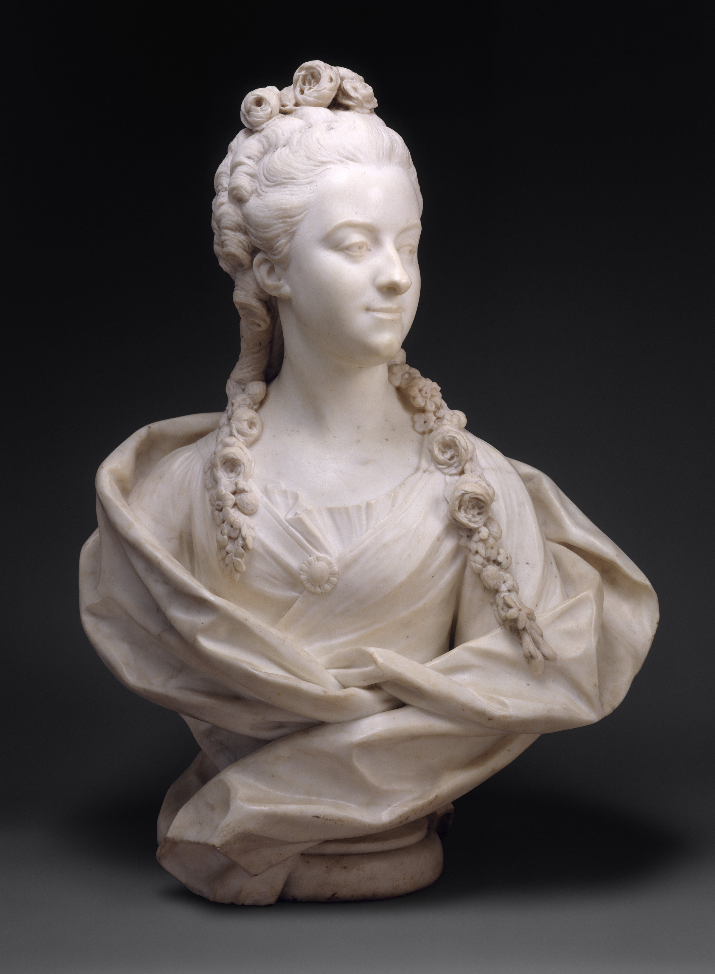 French; Bust; Sculpture